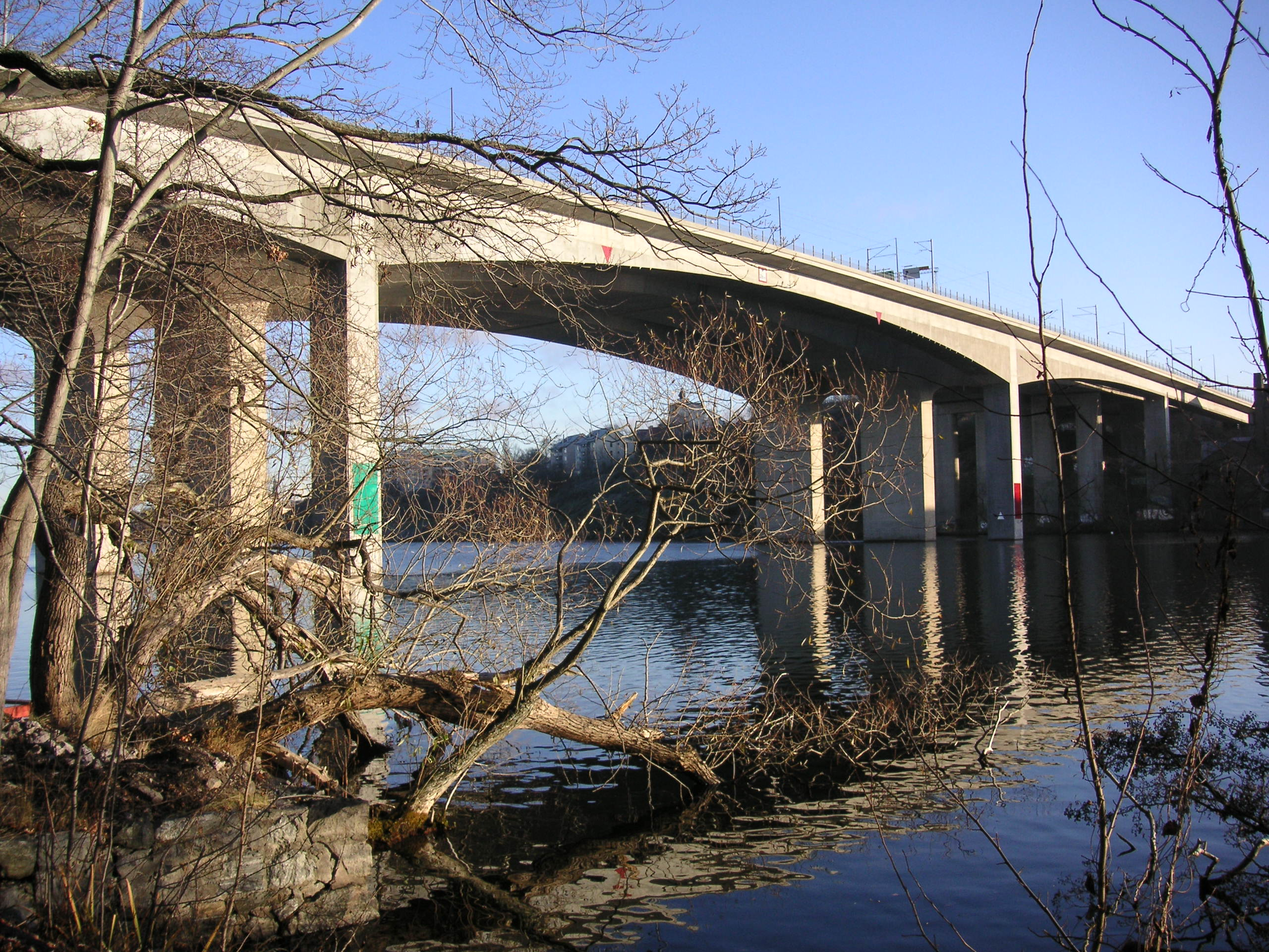 Gröndalsbron i Stockholm, närmast är spårvägsbron.